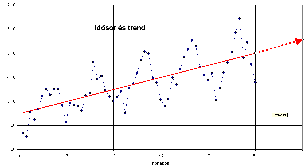 Time serie and trend illustration